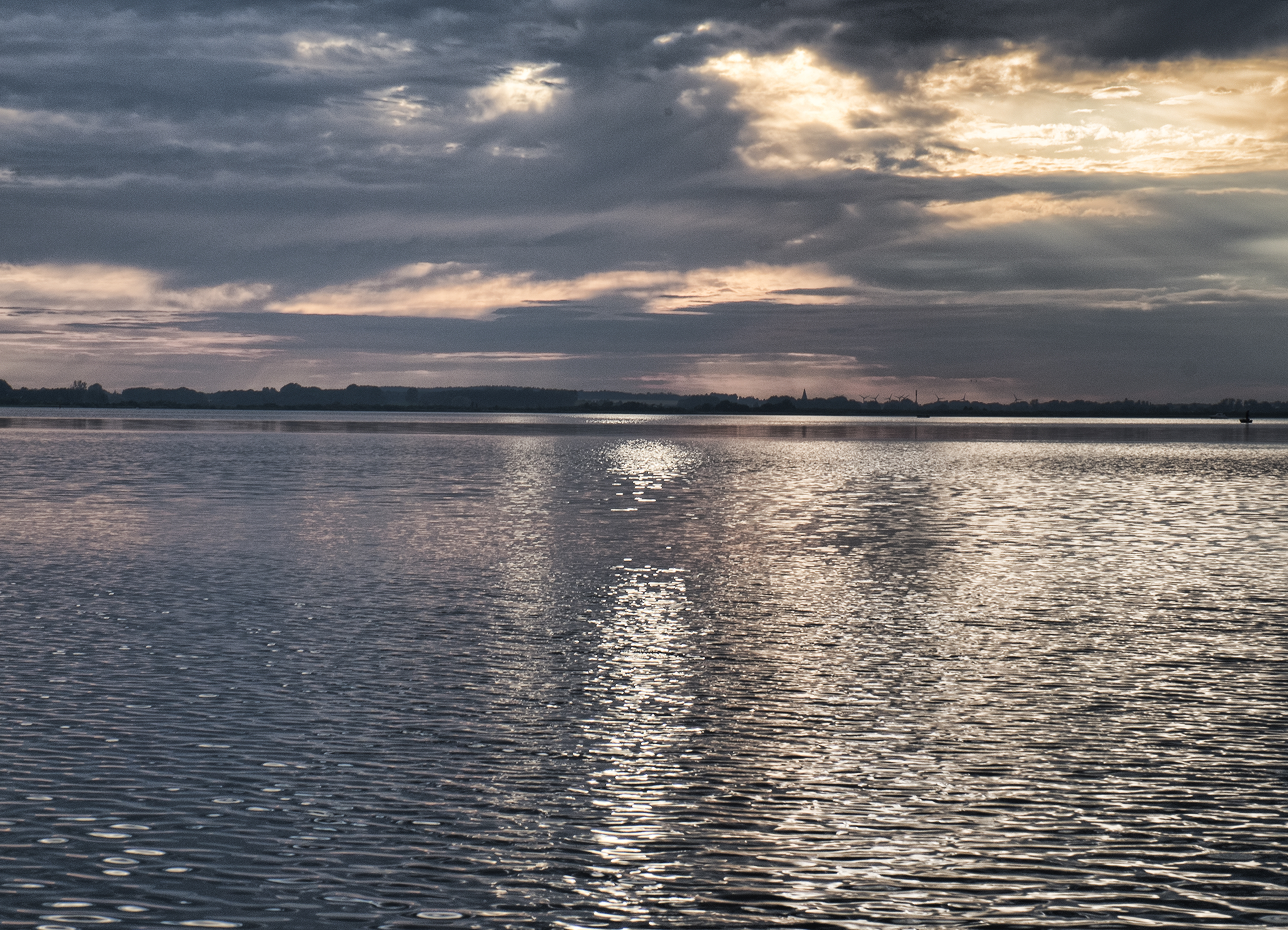 Kummerower See von Sommersdorf aus kommend